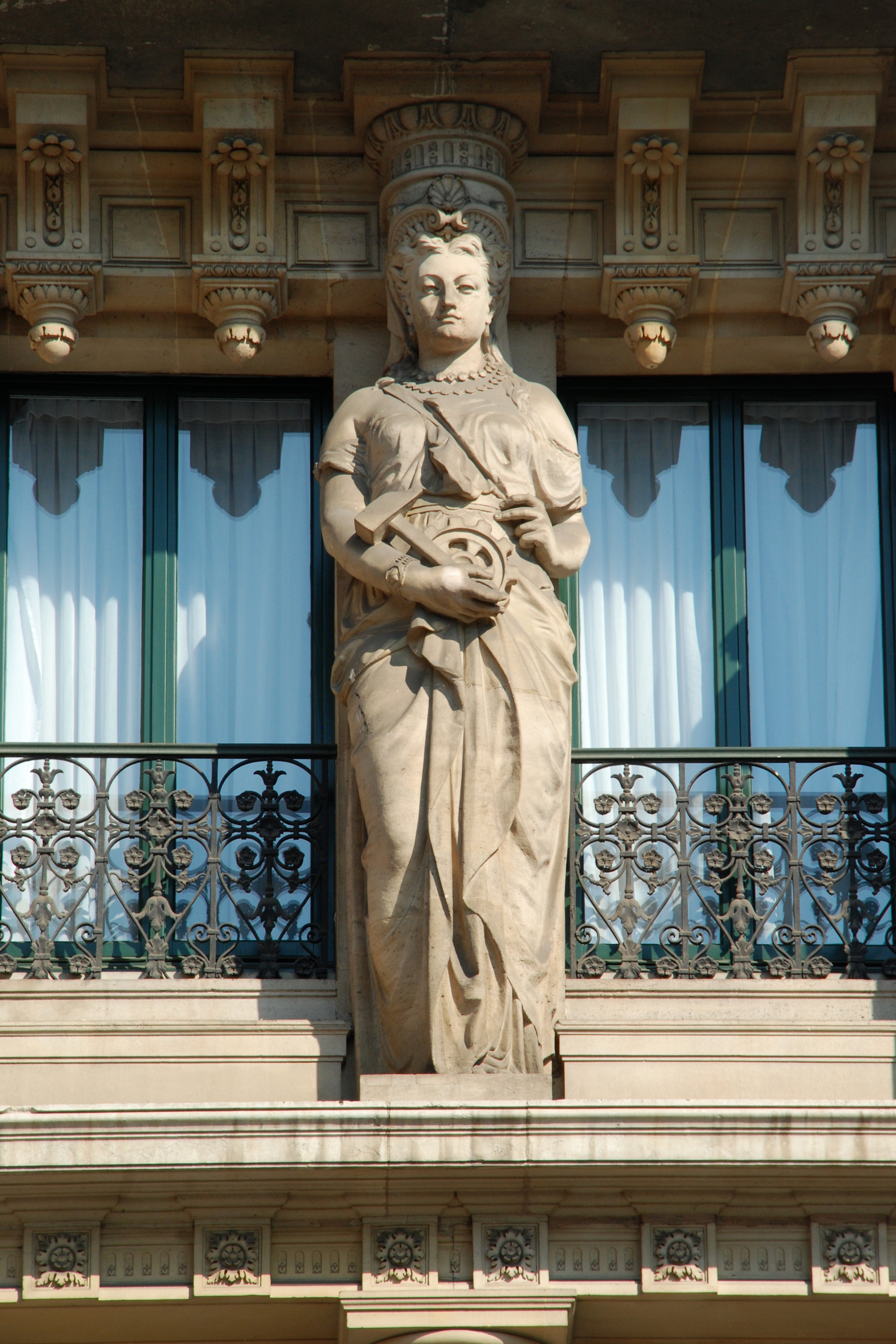 Belgique - Bruxelles - Café Métropole (architecte Gédéon Bordiau)